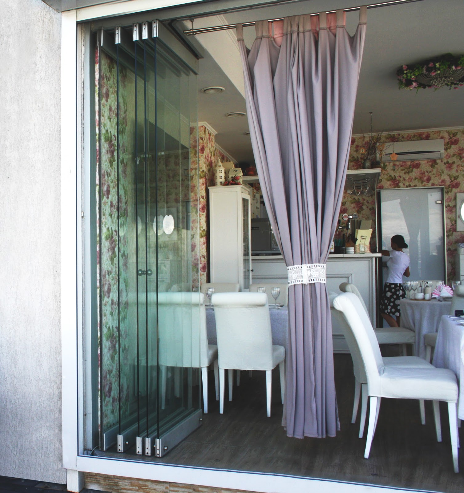 Система остекления в сложенном виде, загородный дом.